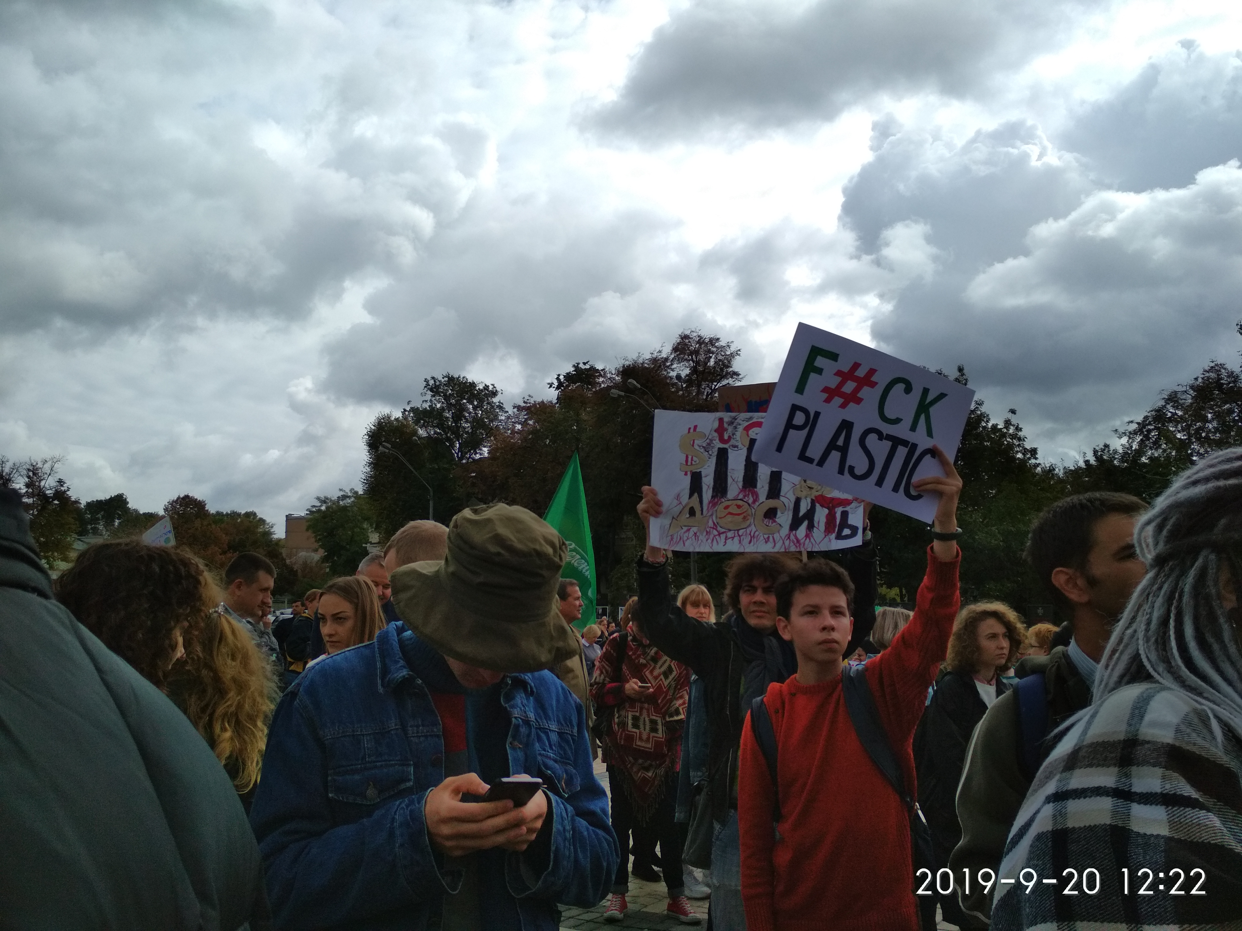 Глобальний кліматичний марш у Києві 20 вересня 2019